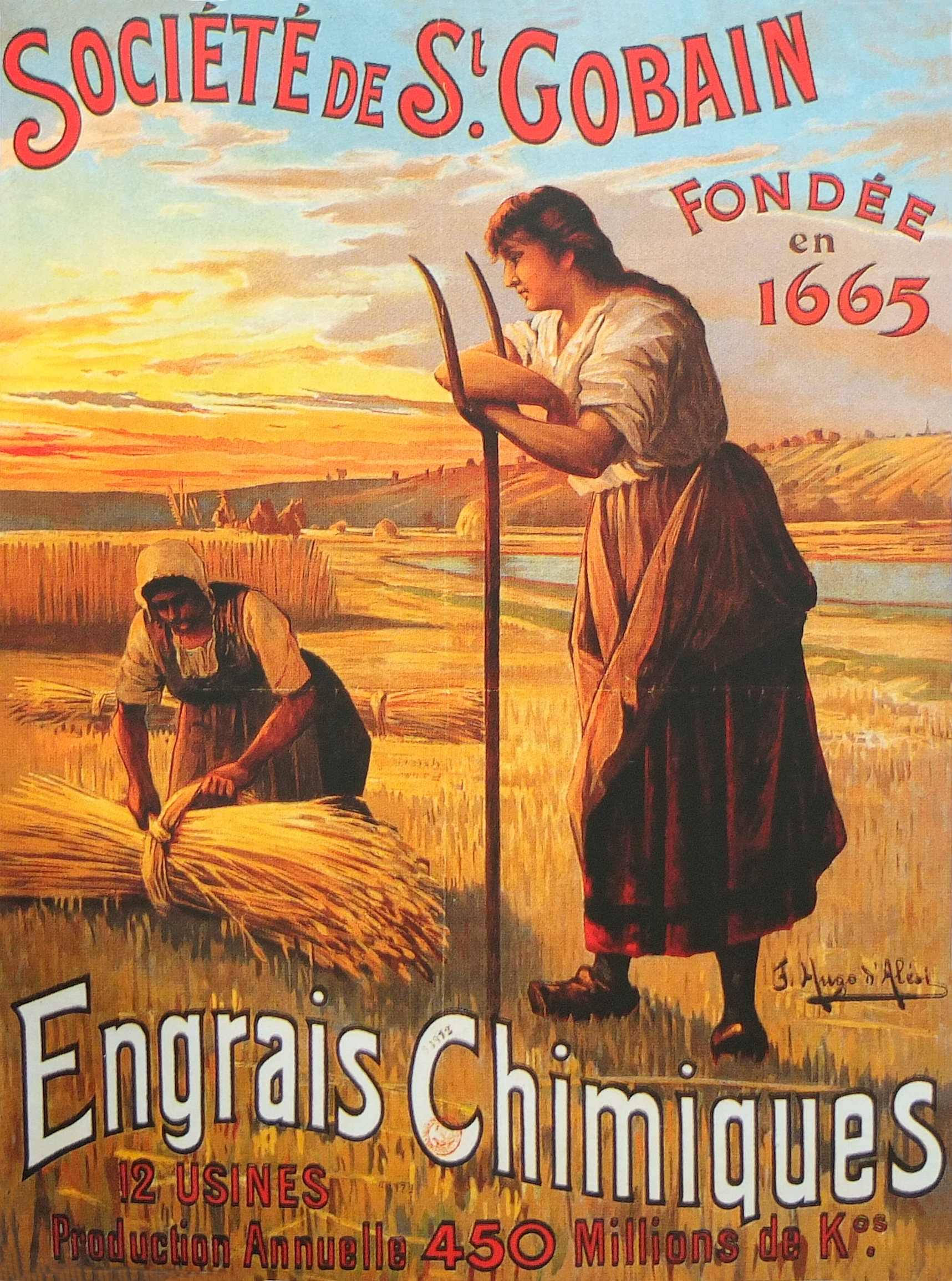 Affiche par Hugo d'Alesi, Engrais chimiques, Société Saint-Gobain. Collection non déterminée.